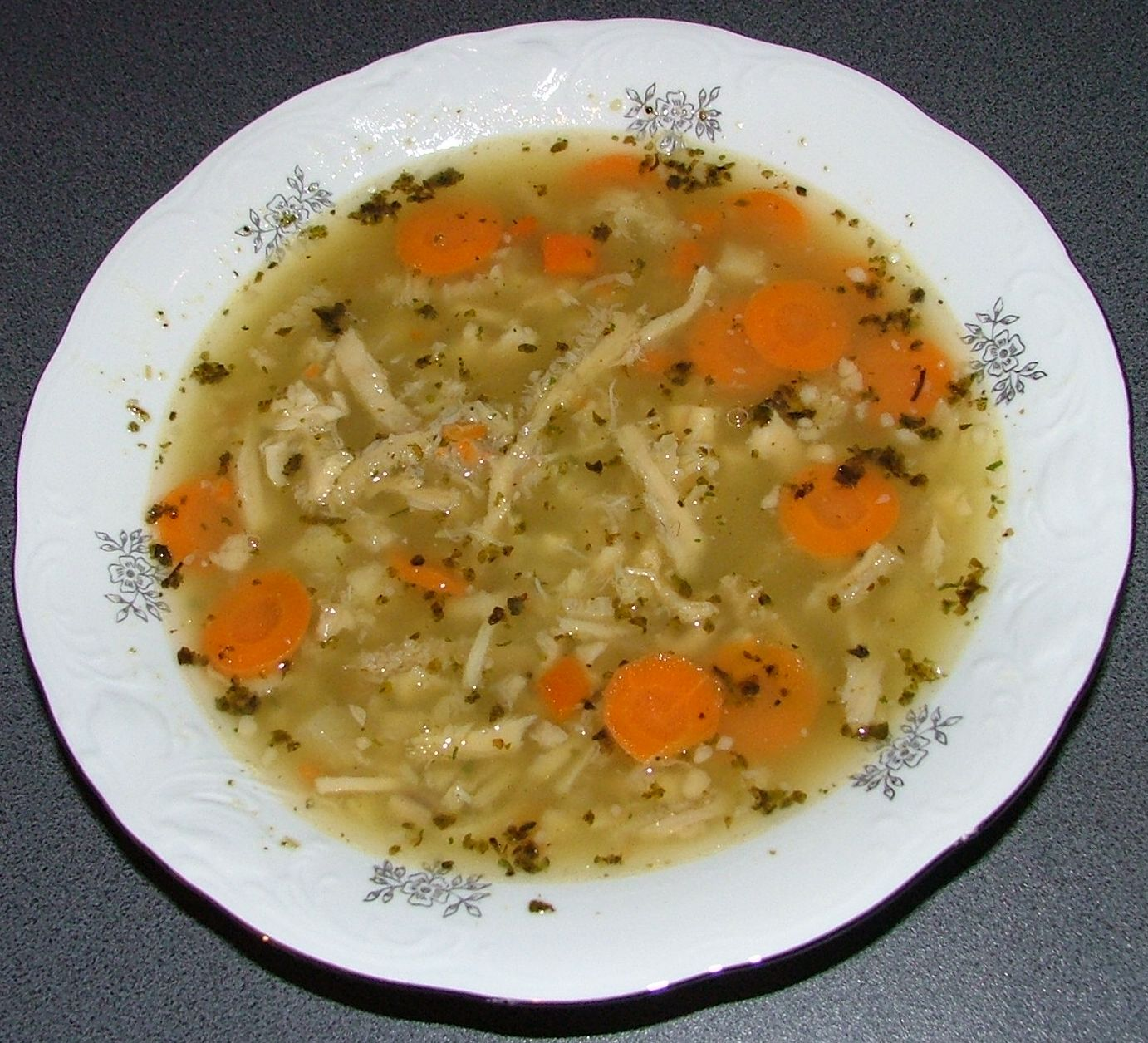 Flaki